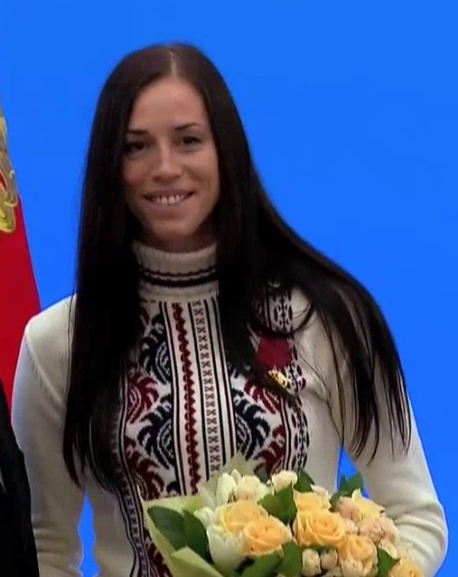 Екатерина Лобышева